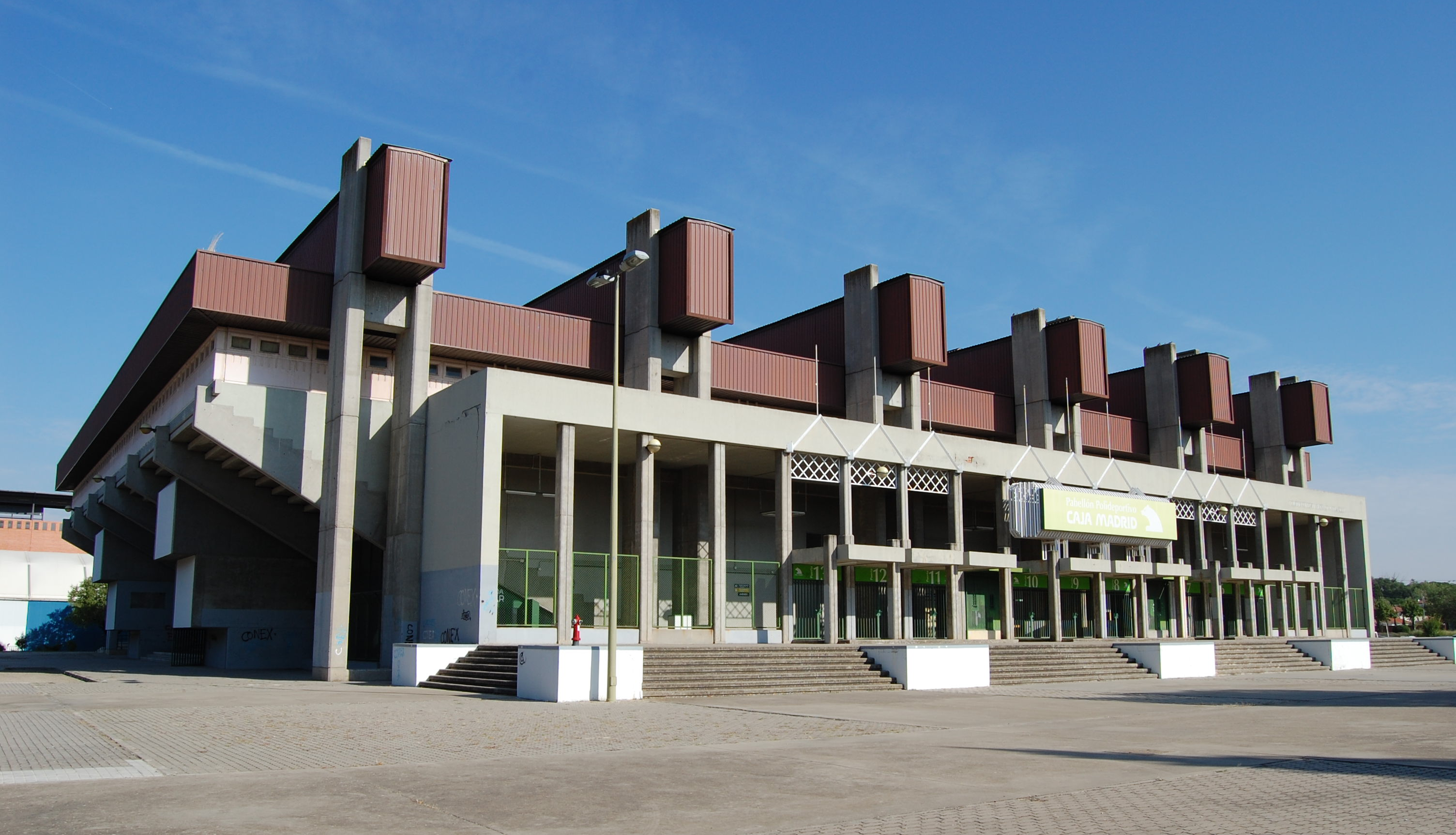 Fachada principal del Pabellón Fundación Montemadrid en Alcalá de Henares (Comunidad de Madrid - España).